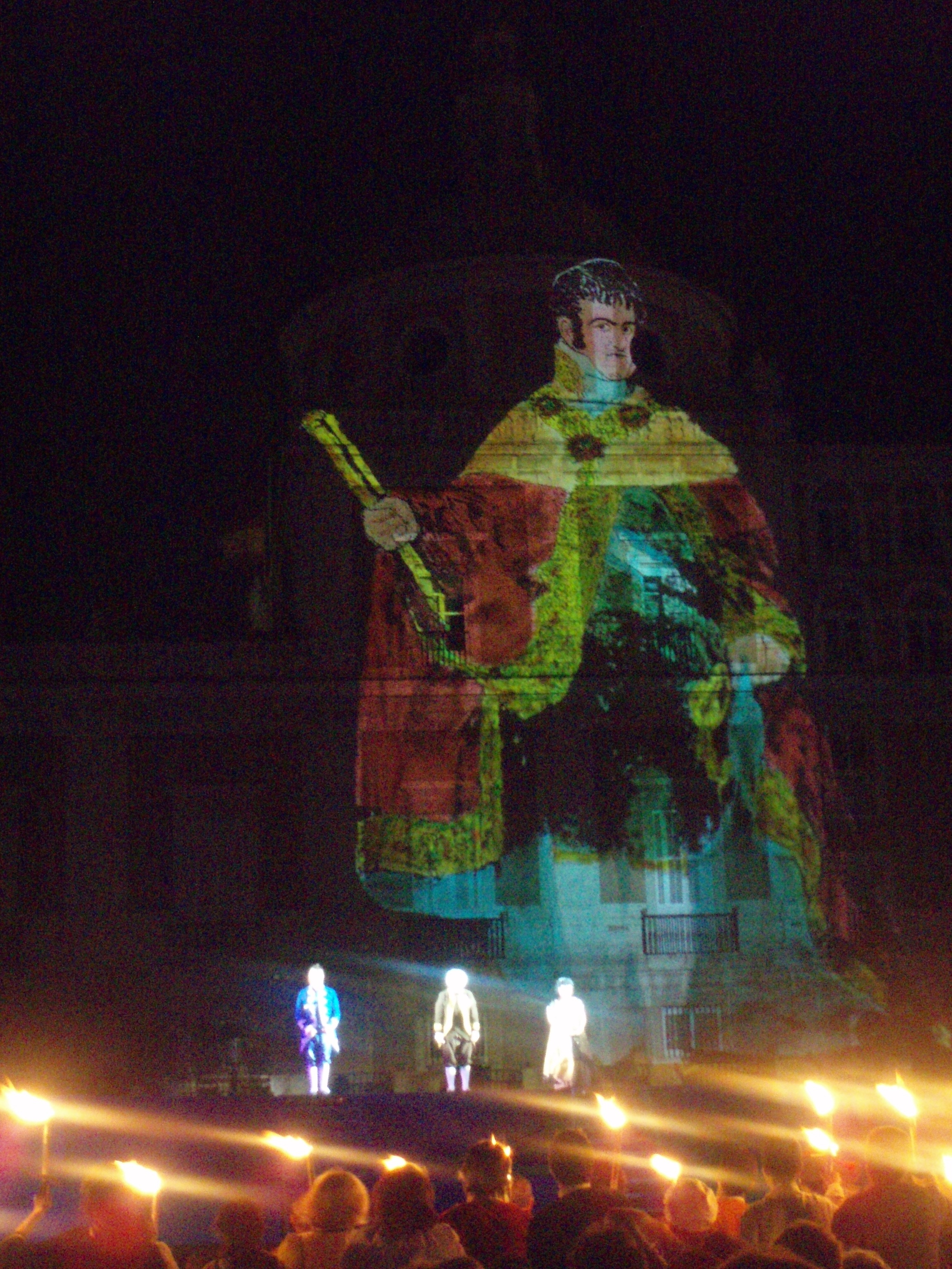 Imagen una escena del Motín. Aparece al fondo el rey Fernando VII sobredimensionado en el Palacio Real. Pertenece a la representación del Motín de Aranjuez celebrado el 11 de septiembre de 2006, en su 25º aniversario. La representación está declarada de interés turístico nacional.